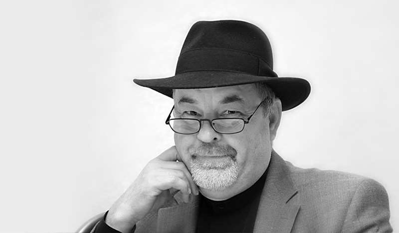 Portrait von Wolfgang Brinkel mit Hut